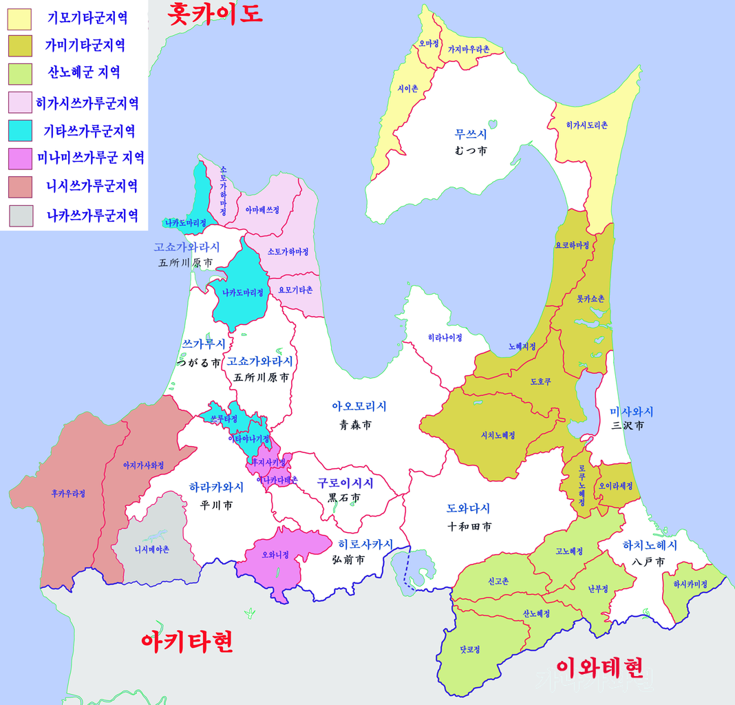 아오모리현 지도